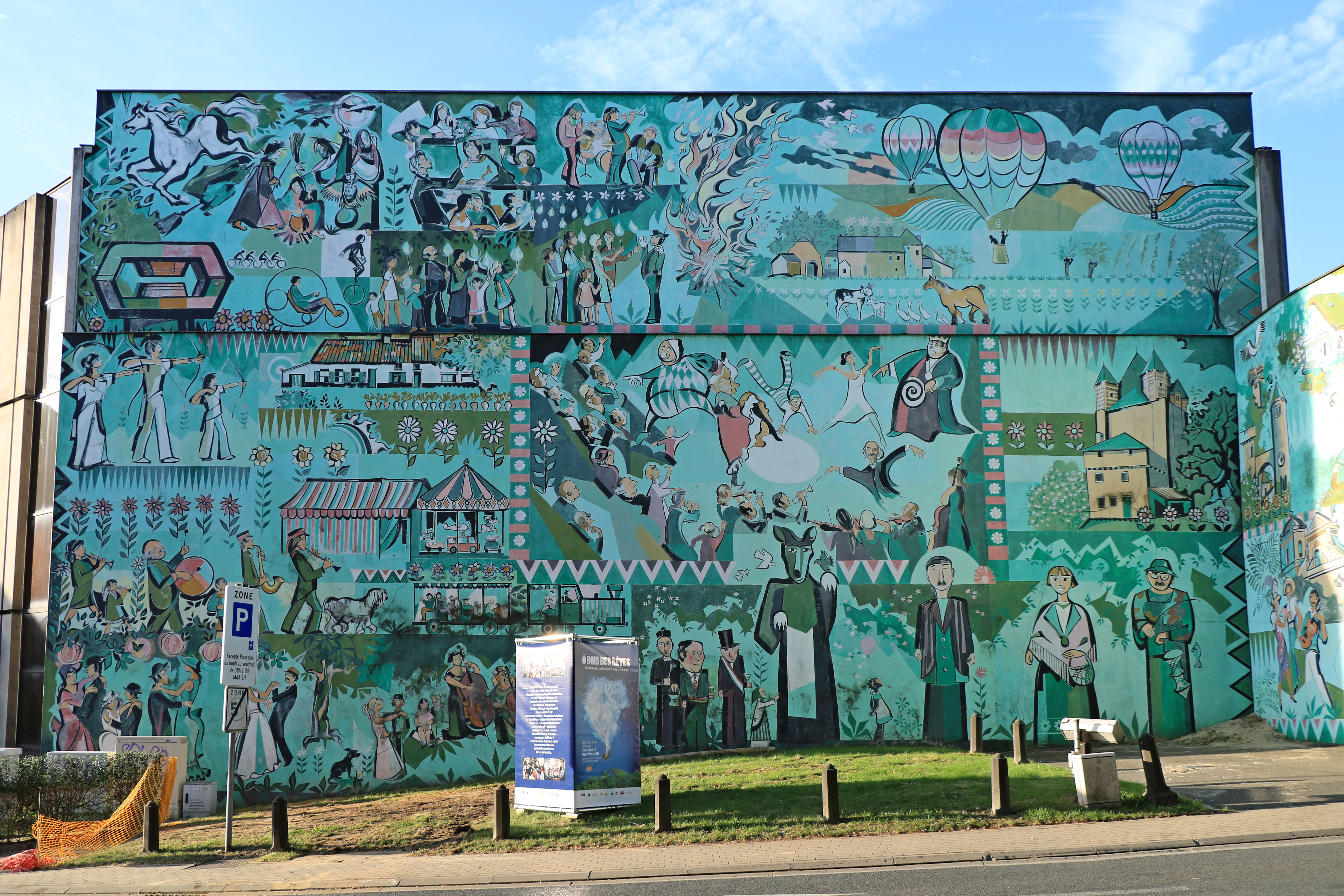 Belgique - Ottignies - Centre culturel - Fresque Rahir «La Liesse populaire» (1993)